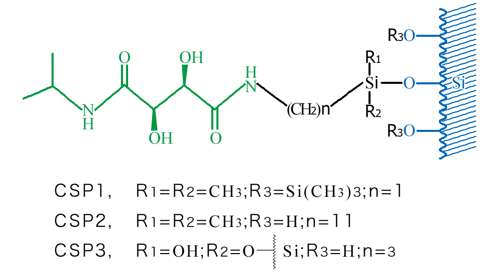 酒石酸をスペーサーを介してシリカゲル表面に結合した光学分割固定相